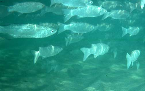 Neomyxus leuciscus